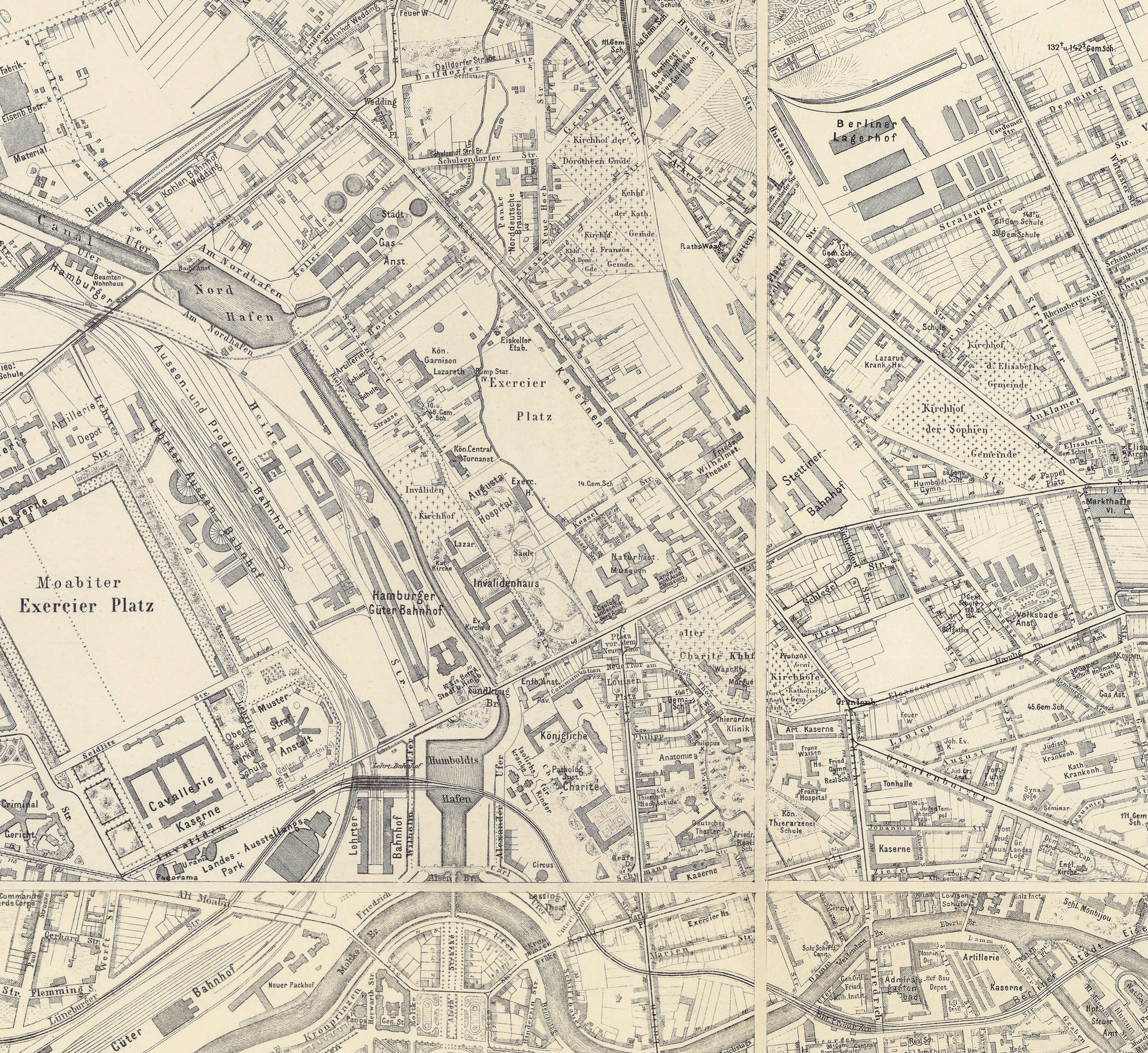 Unter dem Plan steht: "Neu vollständig berichtigte Ausgabe von 1889". Es sind im Gegensatz zu weiteren Pländen derselben Serie keine Planungen in Rot eingetragen. Die erste Ausgabe dieser Planserie erschien 1866.